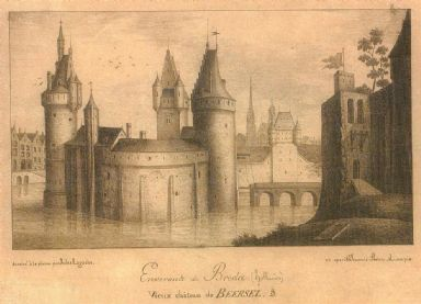 A beerseli kastély ábrázolása egy 16. v. 17. századi metszeten